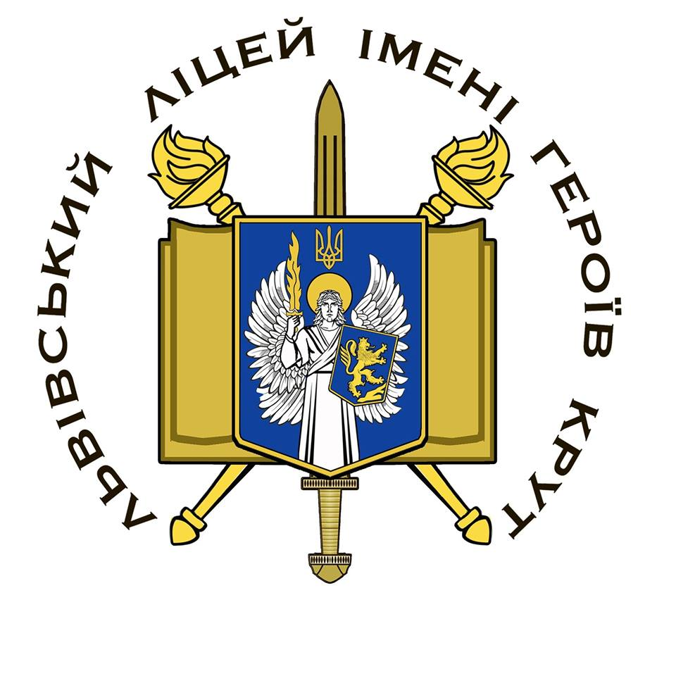 Емблема Львівського державного ліцею з посиленою військово-фізичною підготовкою імені Героїв Крут